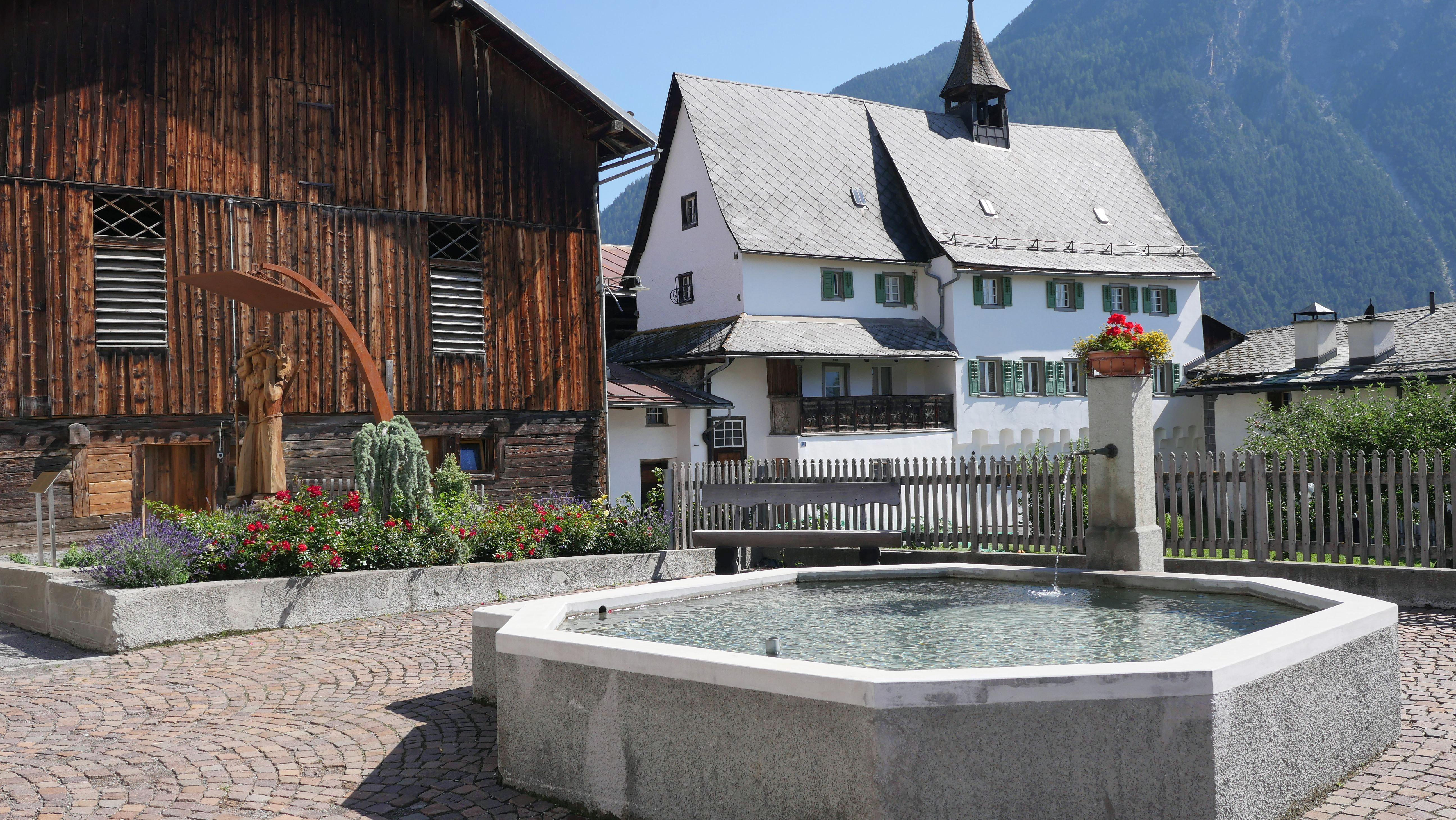 Dorfplatz Salouf (GR) mit Brunnen, Kapuzinerhospiz und Holzskulptur von Pater Alexander Lozza (1880 - 1952). Das Hospiz wurde 1750 gebaut und ist heute Pfarrhaus. Unten im Haus befindet sich eine Kapelle, die auch heute noch benutzt wird.